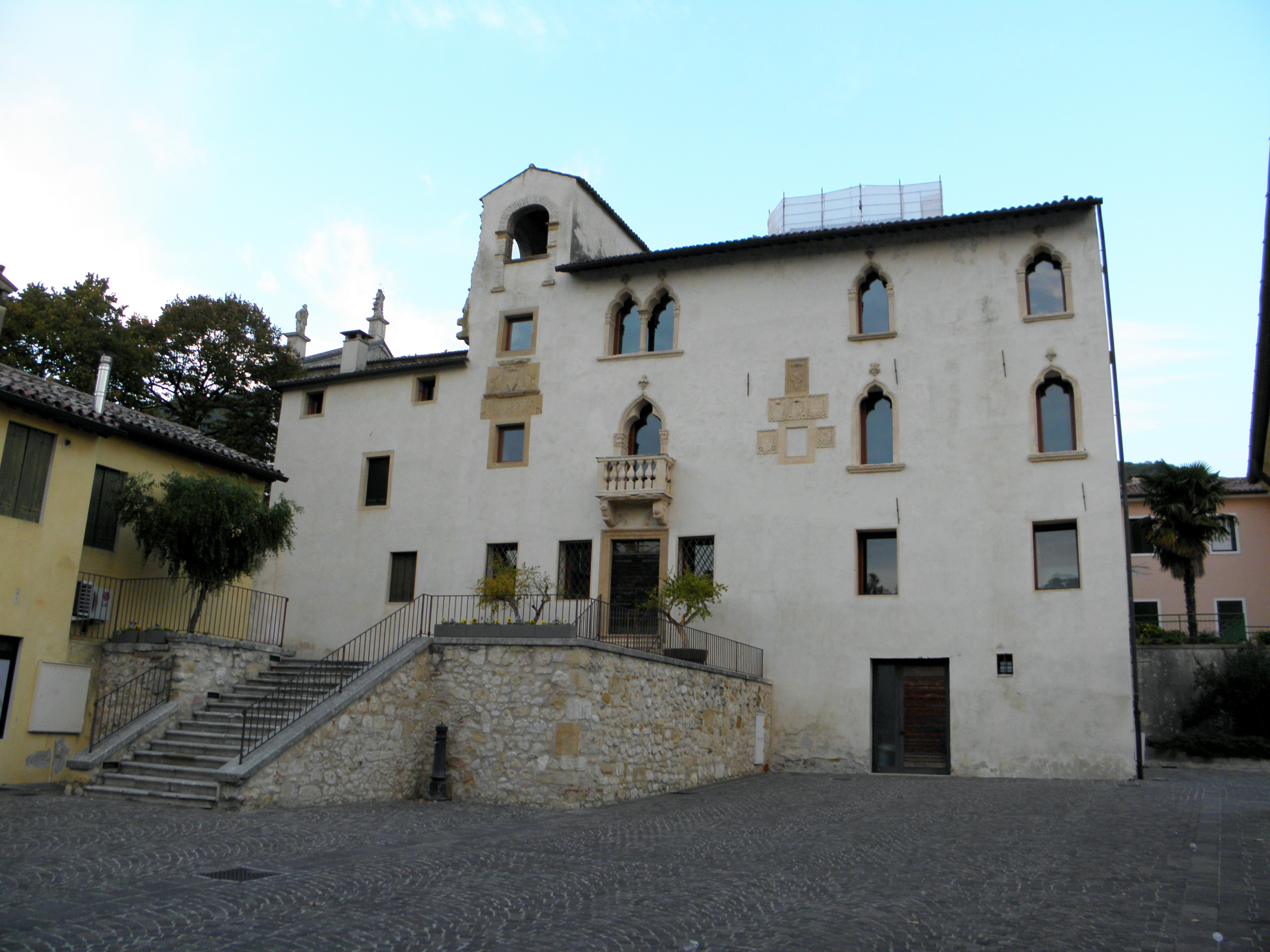 Barbarano Vicentino: Palazzo dei Canonici